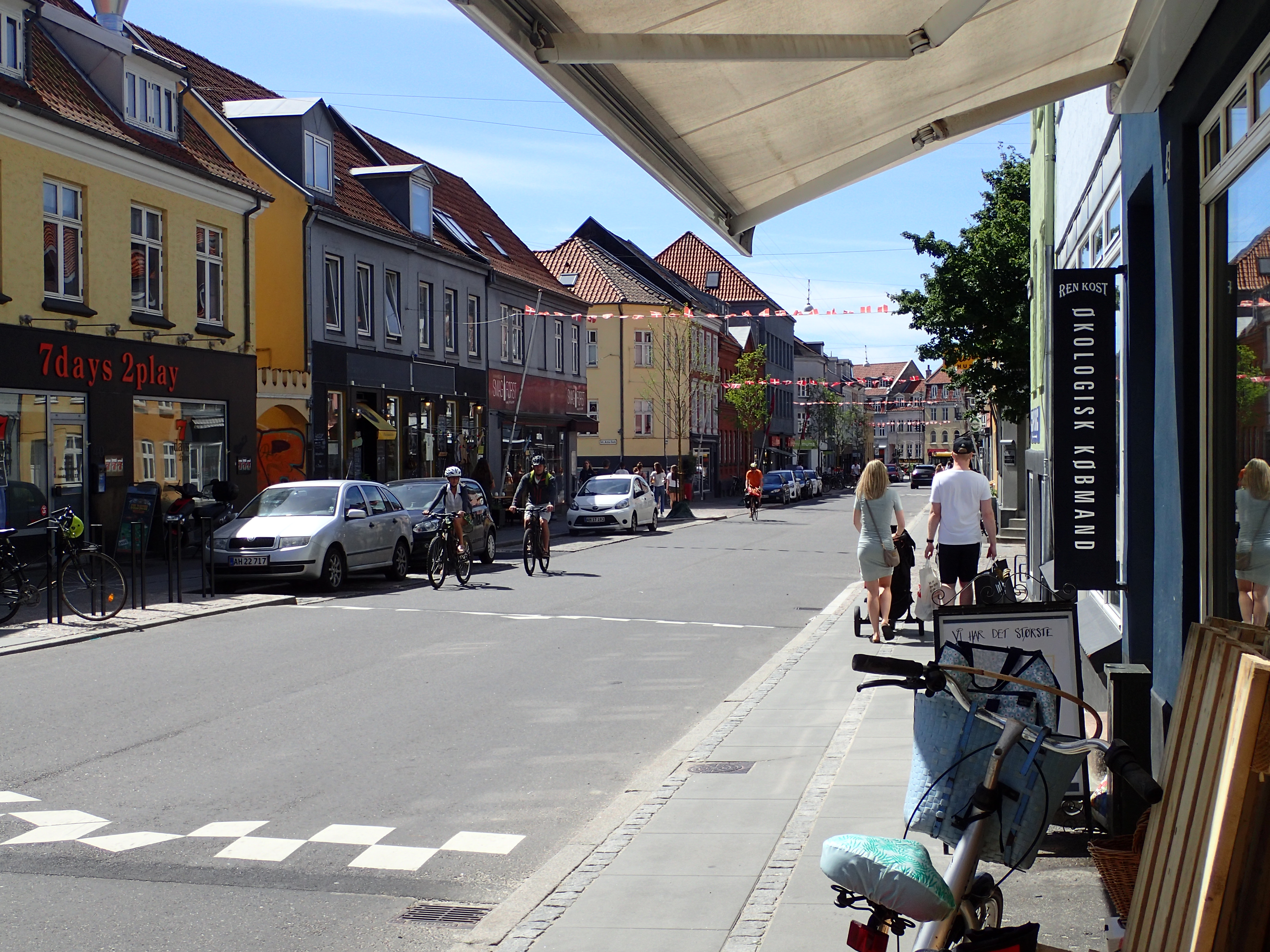 Jægergårdsgade, sommer-scene.